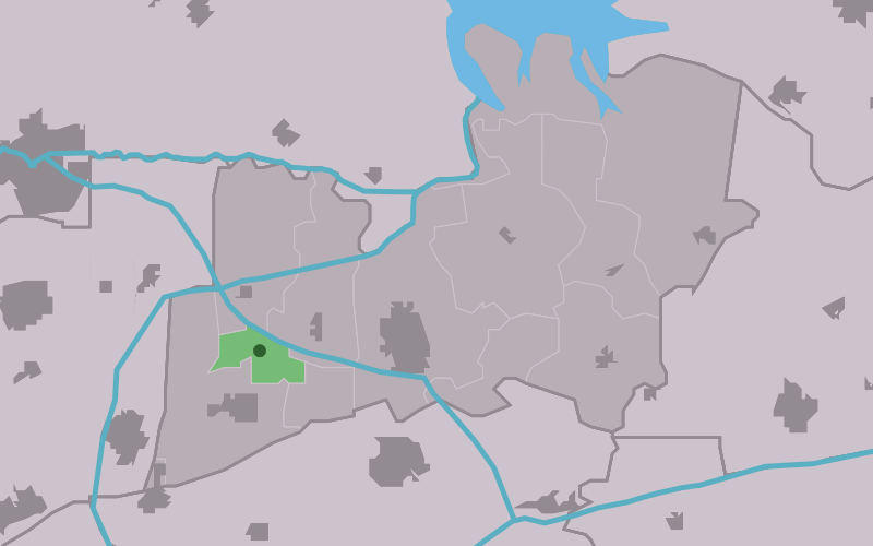 Kaartsje fan himrik fan De Trieme